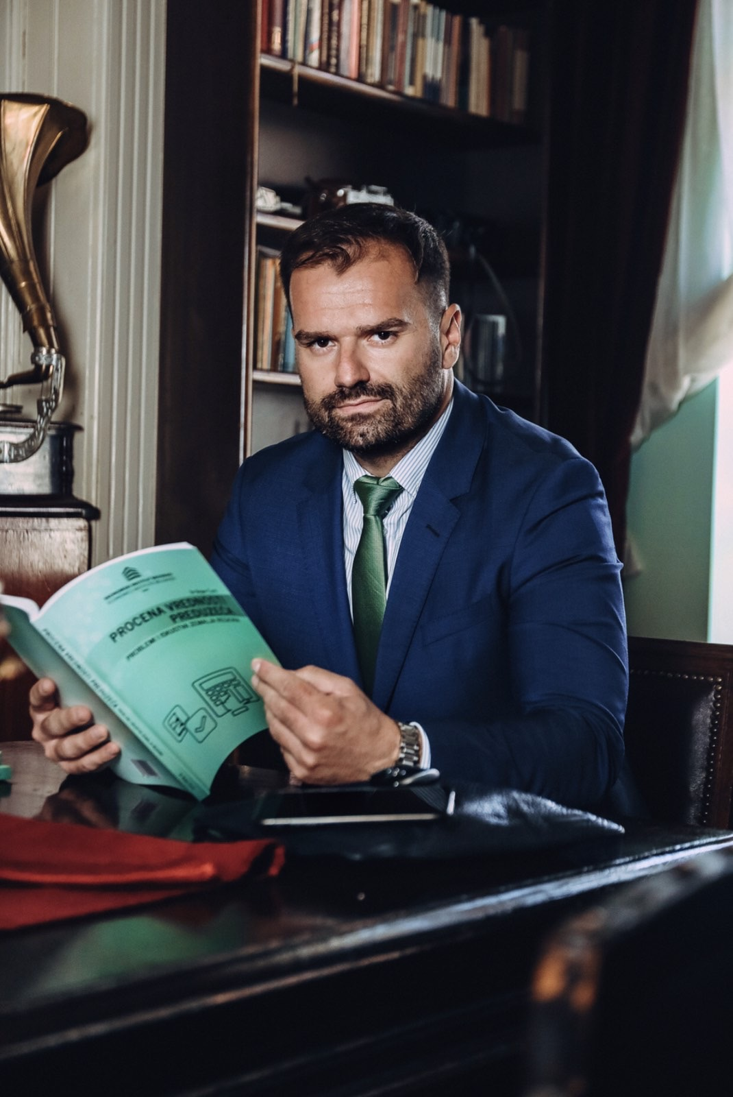 Bojan Curic u biblioteci u junu 2020.